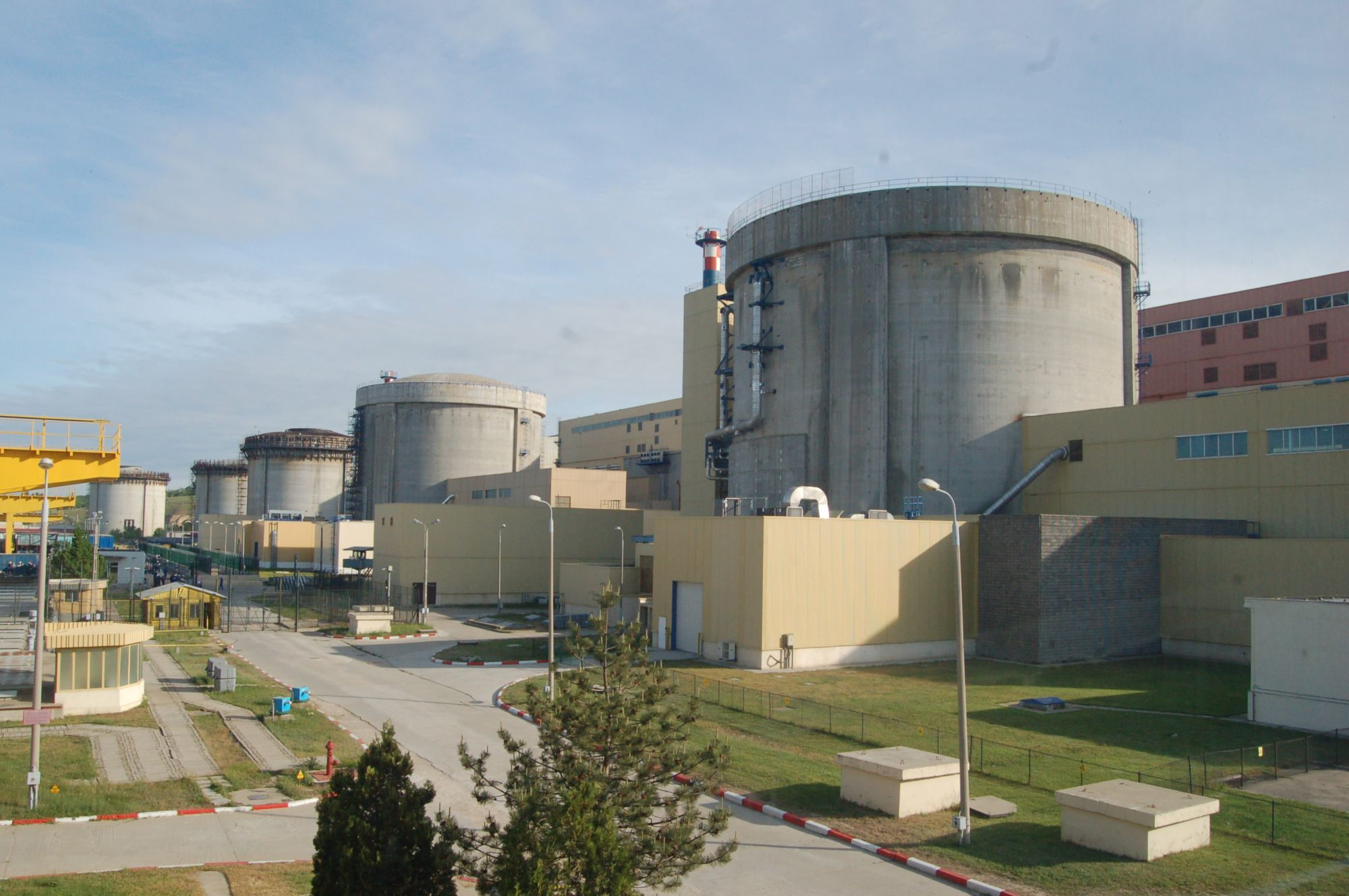 CNE Cernavoda Unittile 1-5